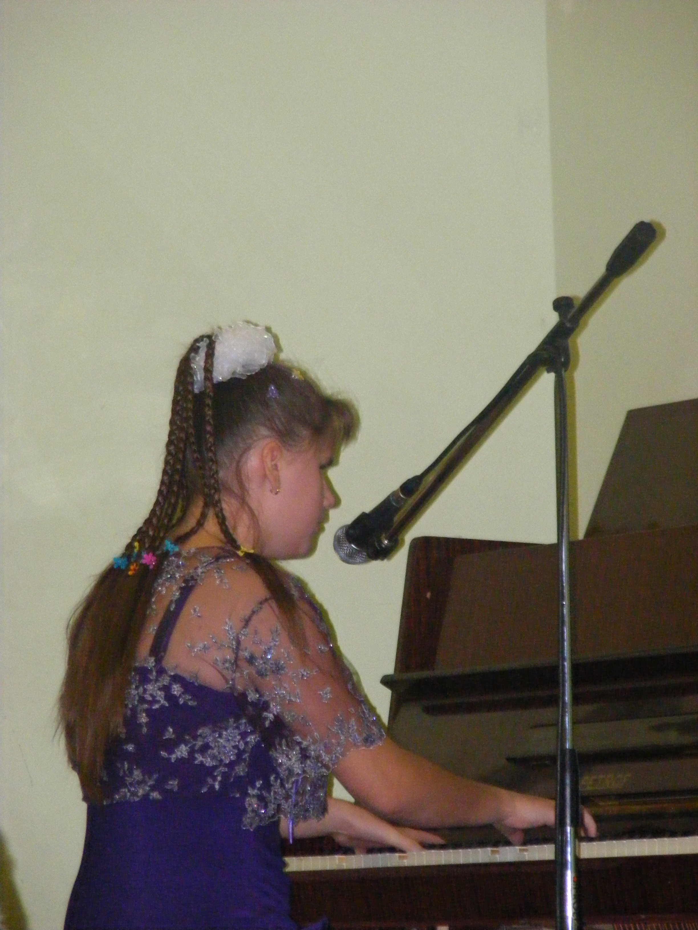 Наталія Писаренко, Росія, Ростов-на- Дону. 1 місце в номінації "Дитяча творчість". підномінація "Музика: колективи і окремі виконавці". Дівчина грає на 4-х музичних інструментах, сама пише музику та вірші, вчиться в загальноосвітній школі. Незряча від народження.